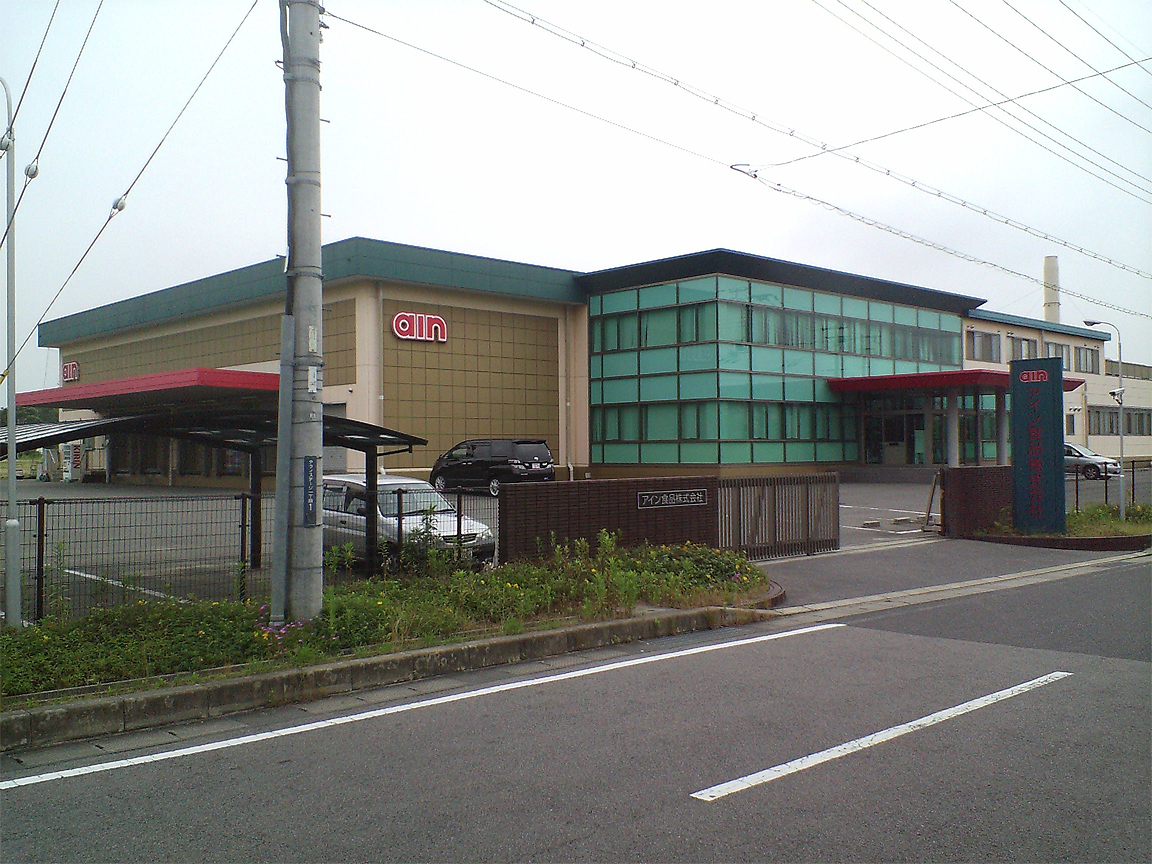 投稿者自身が『アイン食品株式会社 本社』 （大阪府和泉市テクノステージ1丁目1番1号）を撮影。